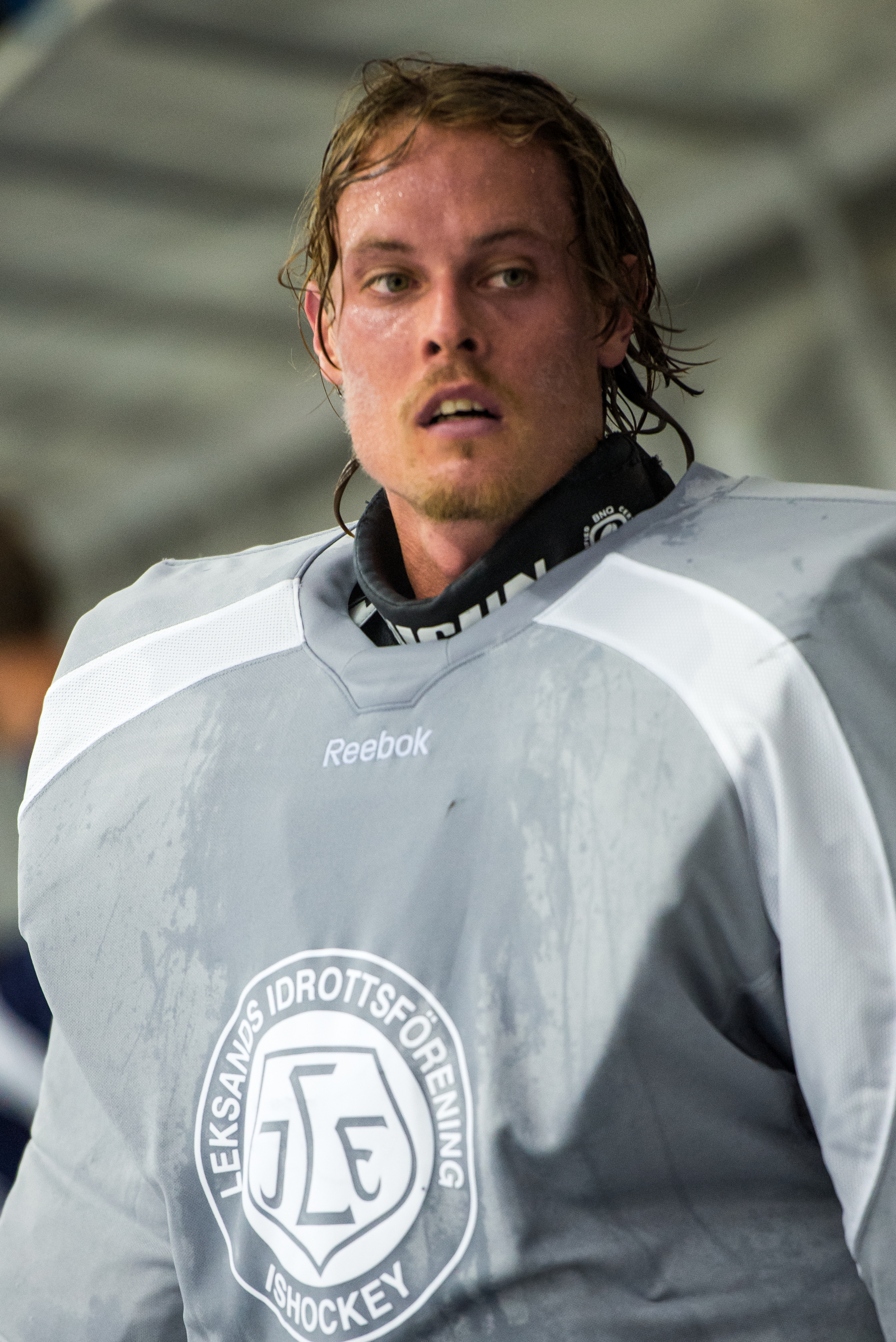 Joel Gistedt, målvakt i Leksands IF säsongen 2013/2014.